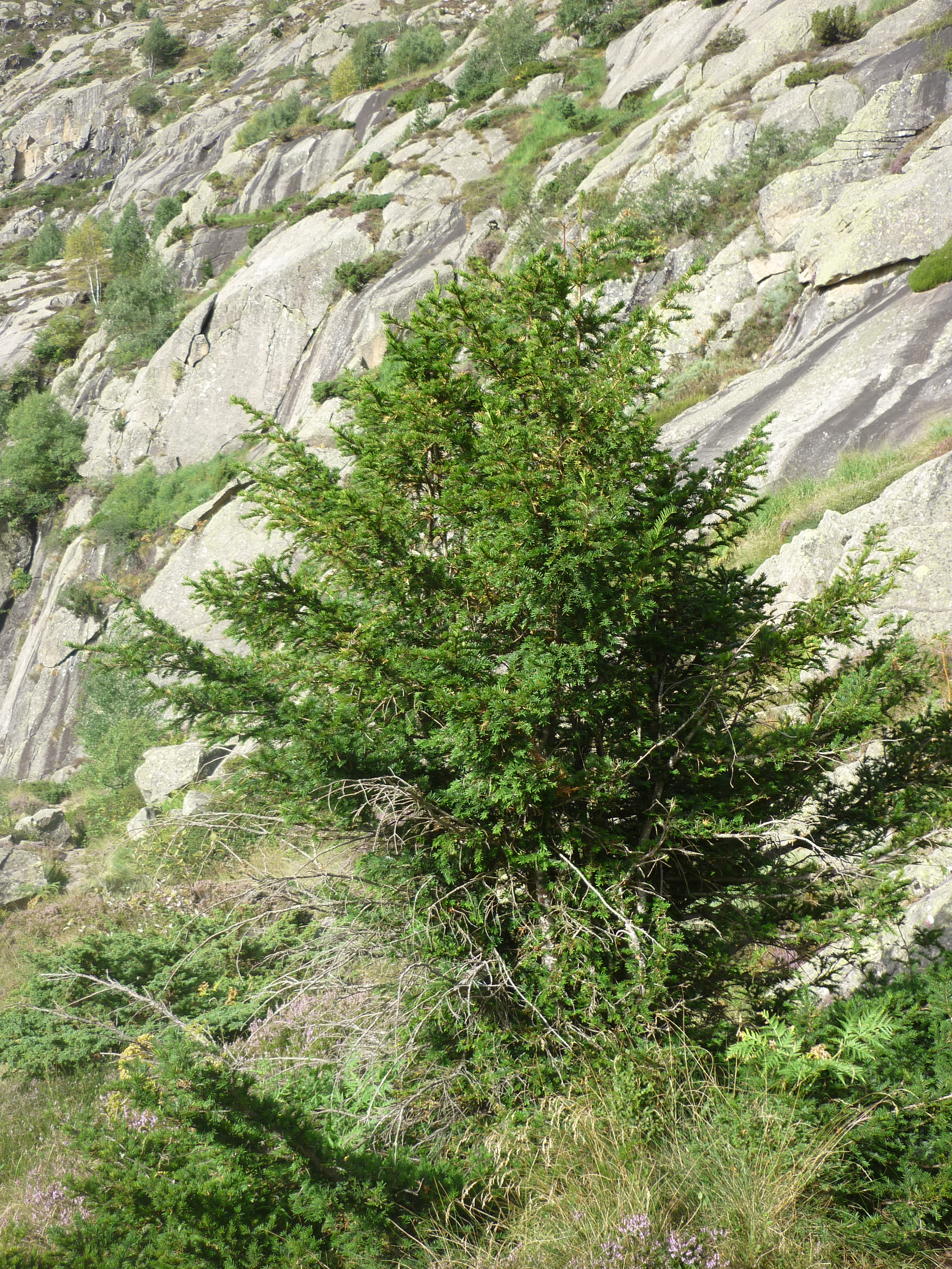 if en limite de végétation forestière, altitude 1550 mètres, commune Auzat, Bassiès (Ariège), en bordure du GR 10